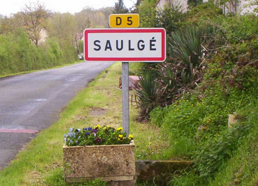 Panneau d'entrée de ville de Saulgé